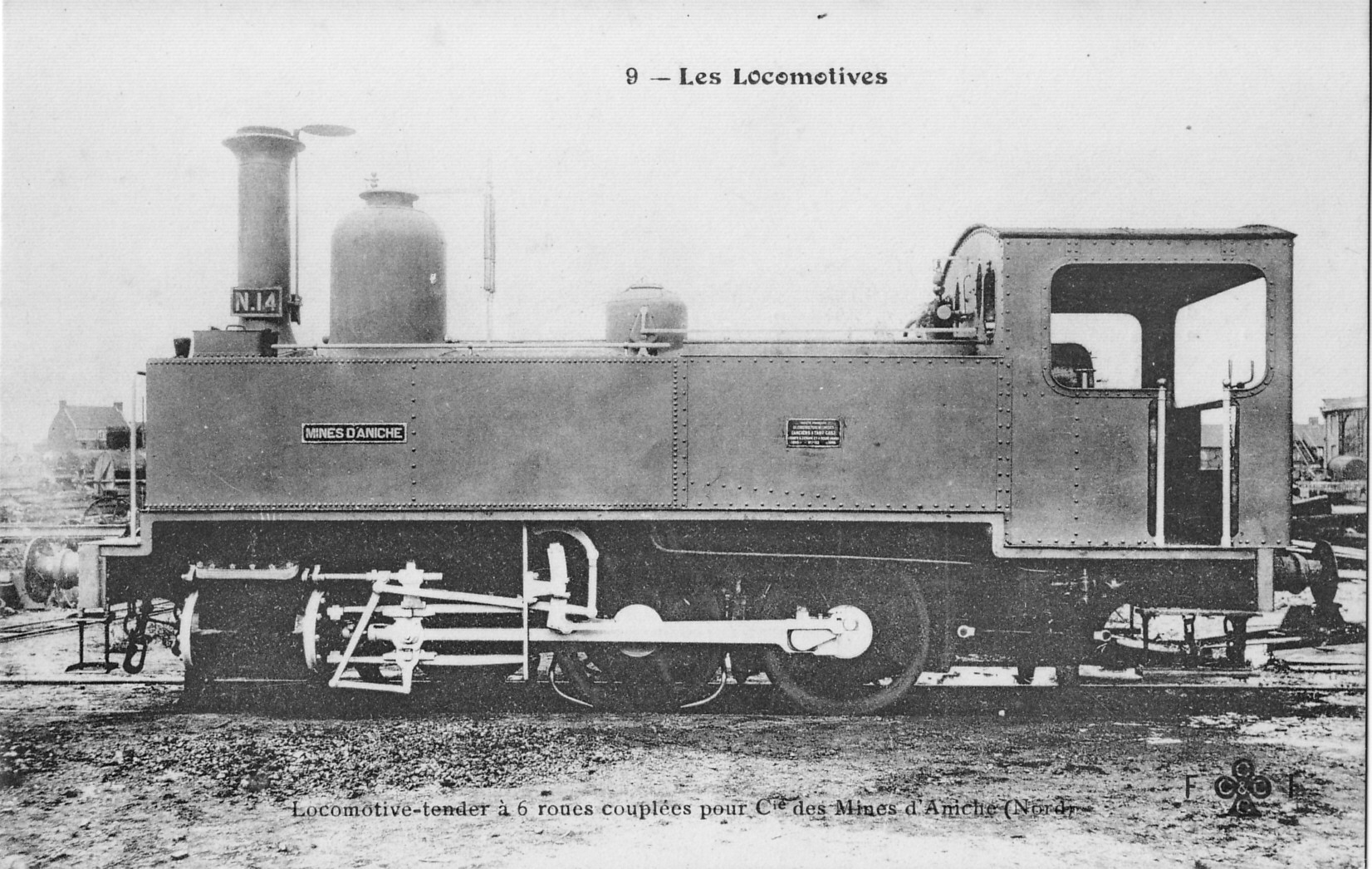 Carte postale ancienne éditée par FF - CCCC, n°9, collection Les Locomotives :Locomotive-tender à 6 roues couplées pour Cie des Mines d'Aniche.Machine n°14